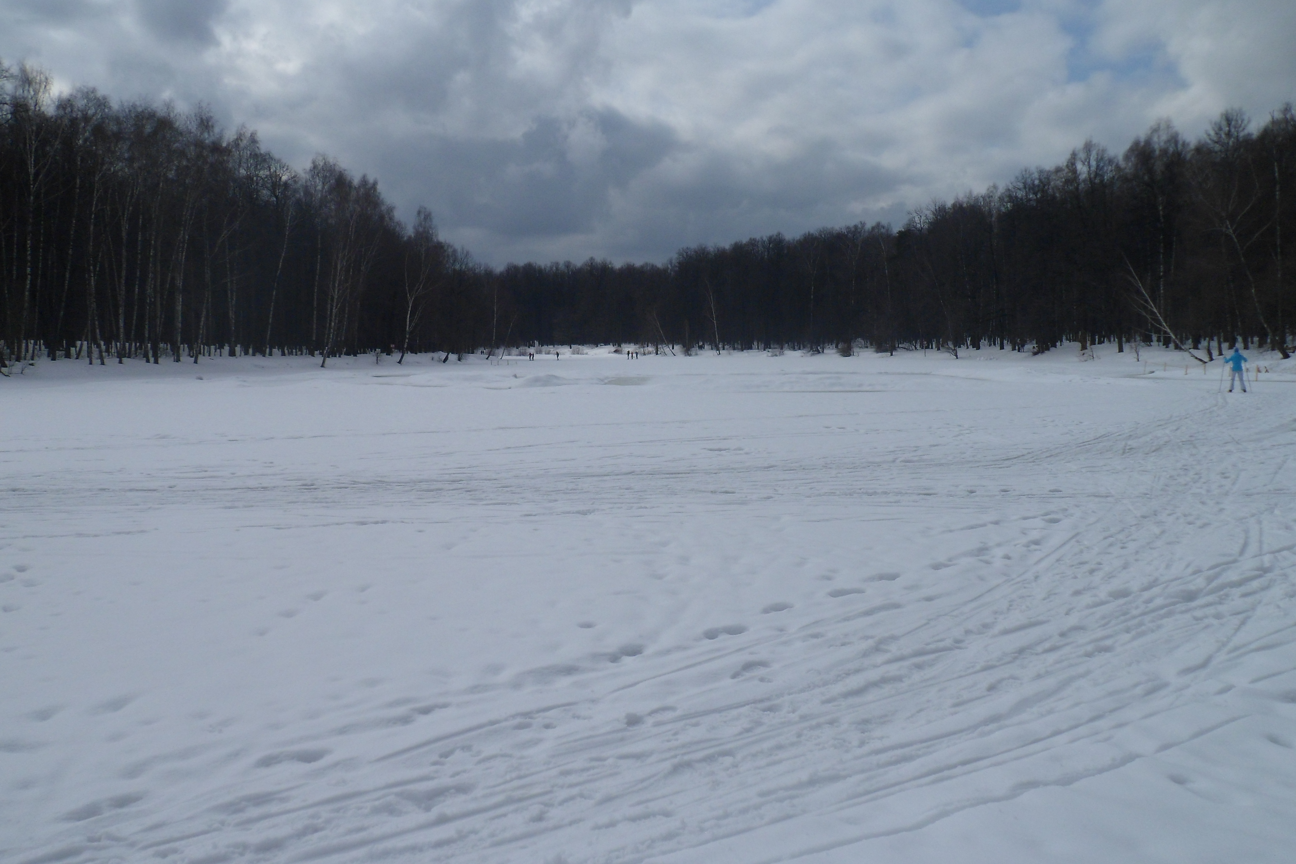 Красный пруд в парке Измайлово. Зима 2012 года.